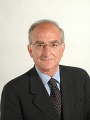 politico italiano